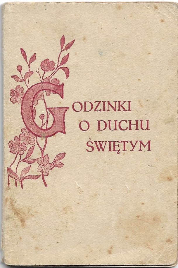 Pierwsze wydanie Godzinek o Duchu Świętym, Kraków 1930